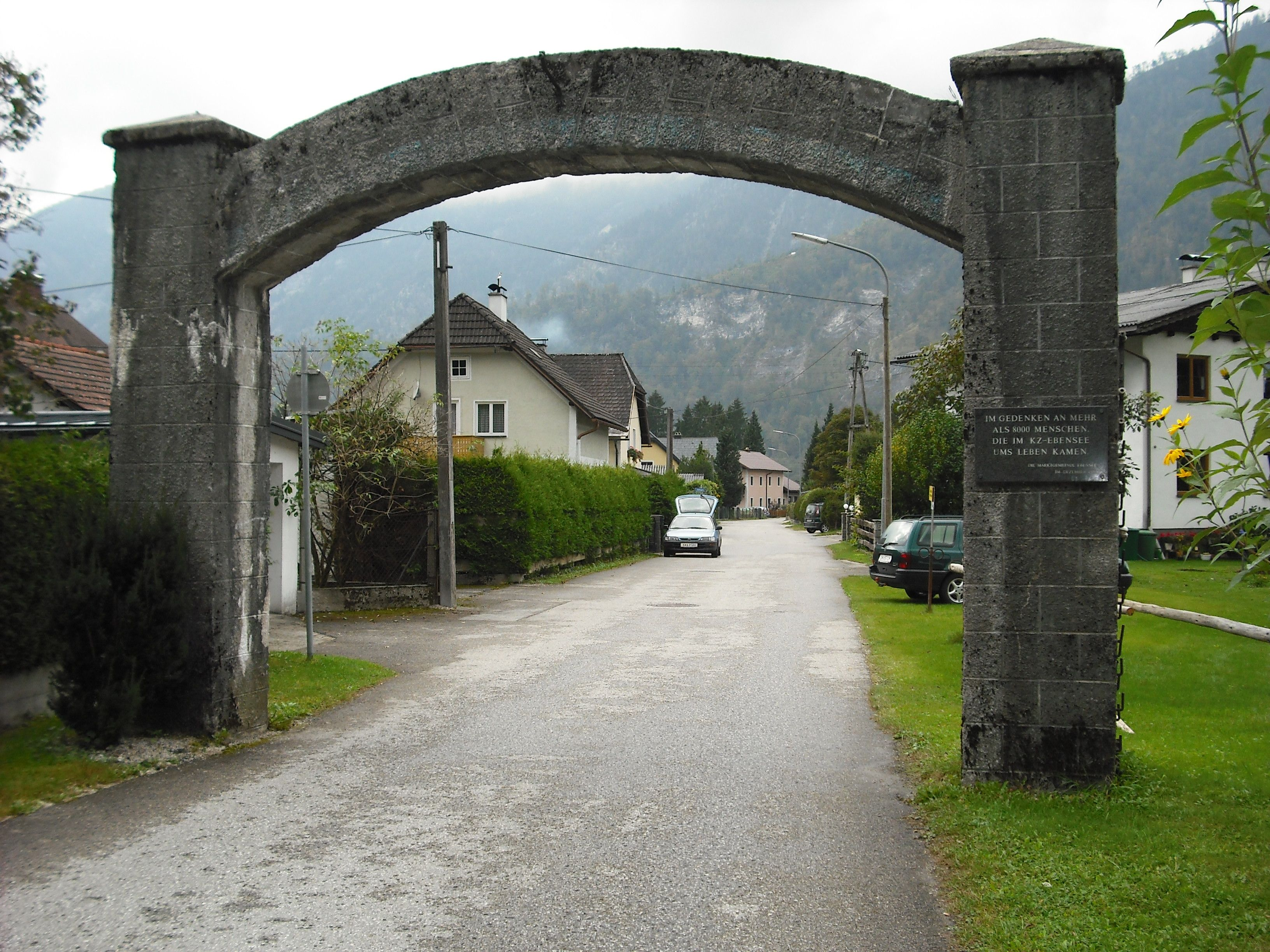 portale di ingresso in granito del campo di concentramento di Ebensee